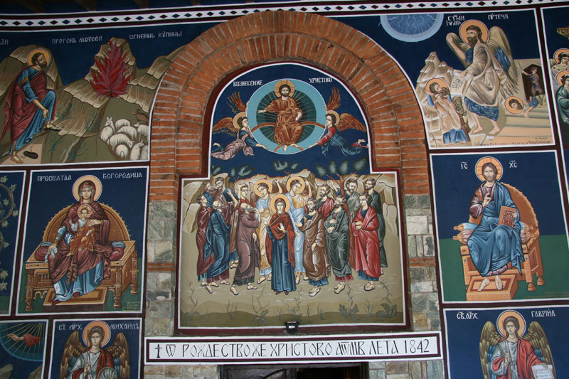 Фреска на влезната врата од црквата посветена на Вознесението Христово во Гевгелискиот Манастир